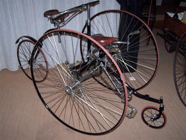 Quadricycle (Velorama, Nijmegen, Netherlands)